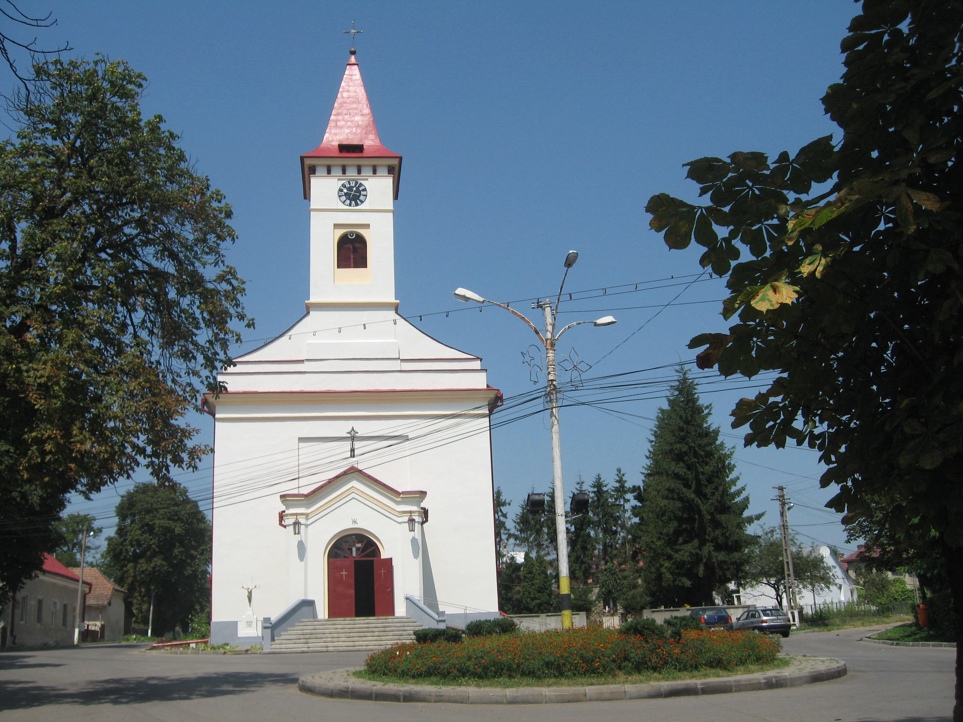 Biserica Nasterea Sf. Fecioare Maria din Siret